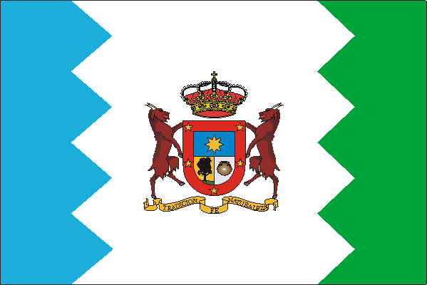 Bandera de Artenara